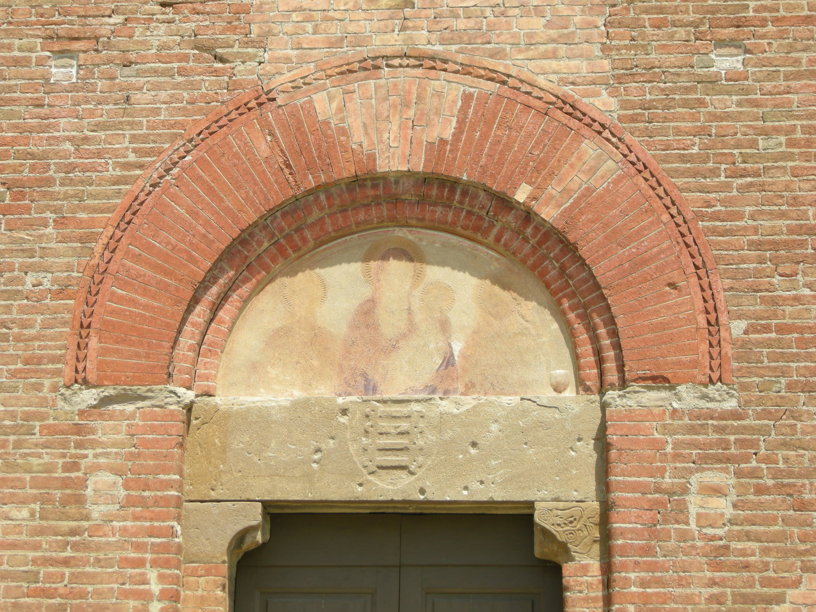 Castelfiorentino, pieve dei ss. ippolito e biagio